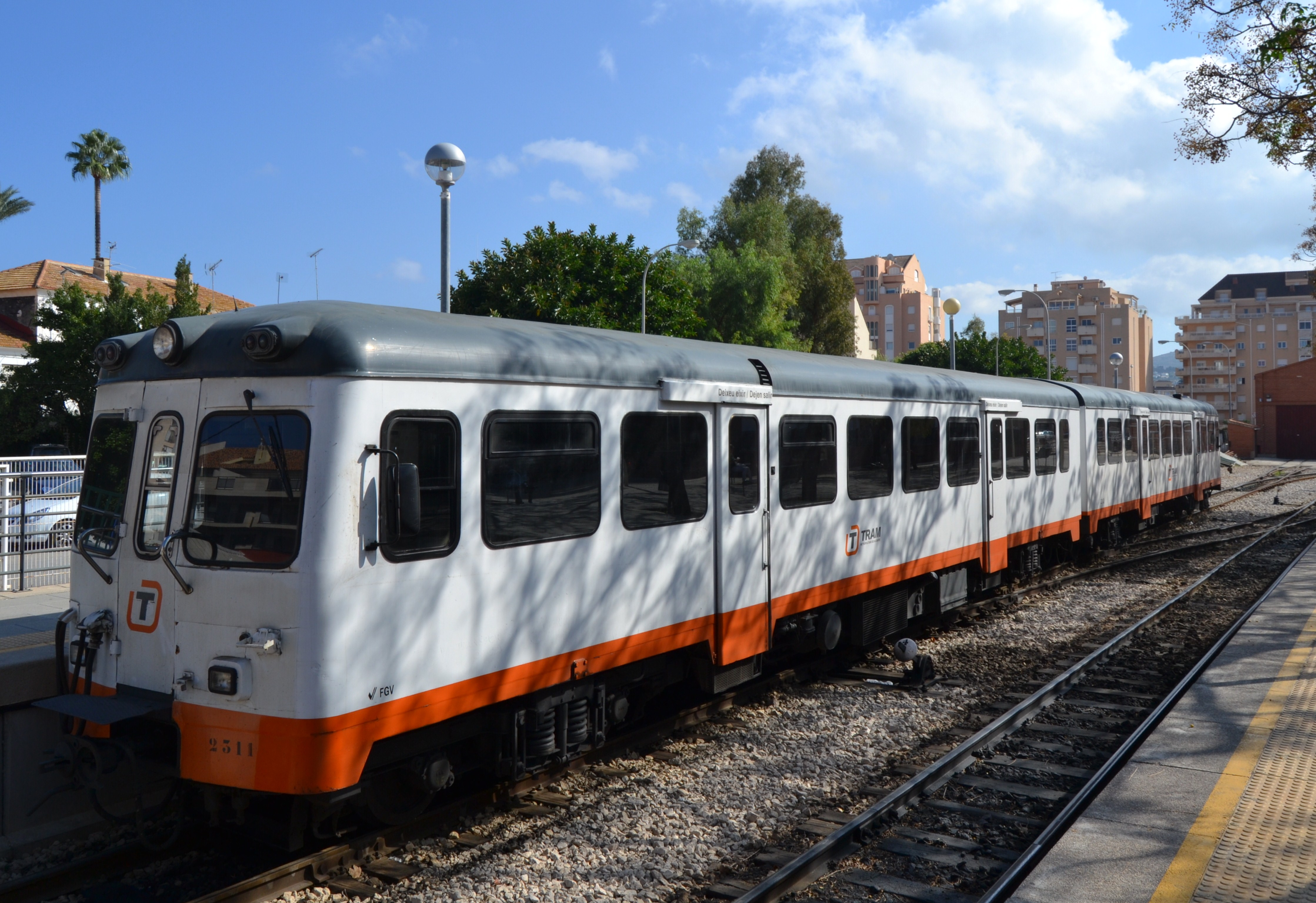 Tren a l'estació de Dénia.